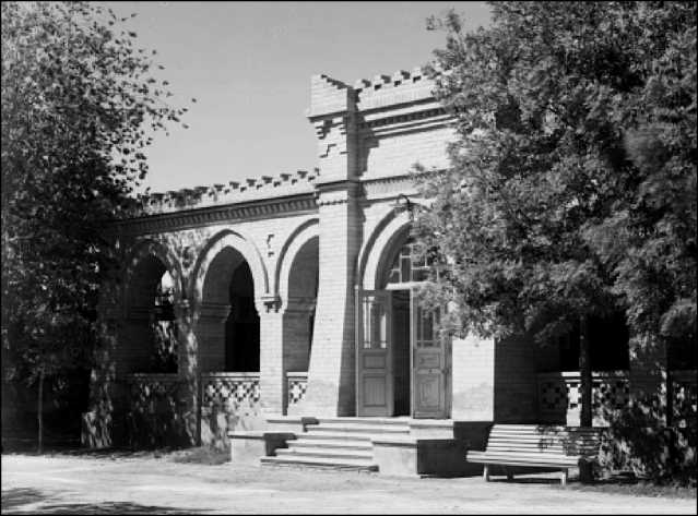 Мургабское имение в Мервском уезде Закаспийской области